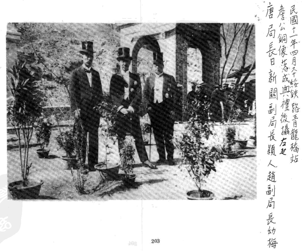 中文（台灣）: 唐日新、關穎人、趙幼梅